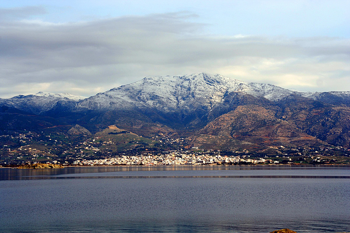 karistos